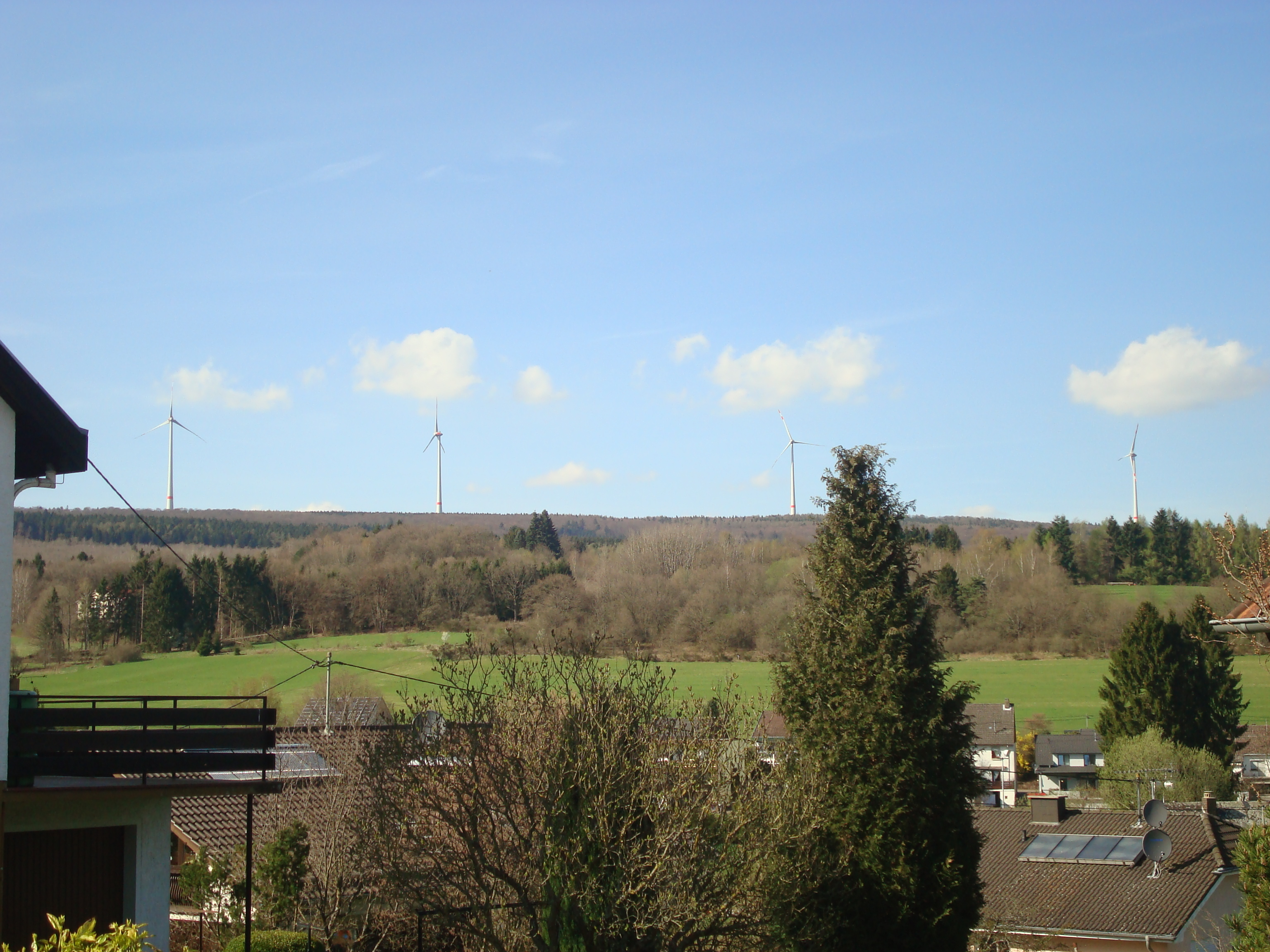 Blick auf den Windpark Schimmelkopf in Weiskirchen